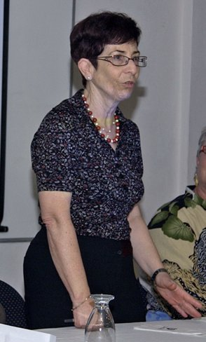 Dvorah Berliner